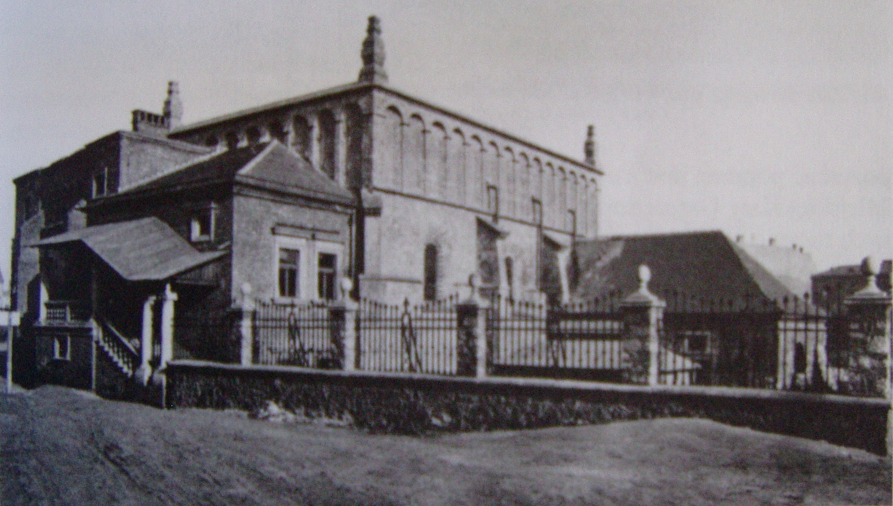 Stara Synagoga w Krakowie w 1913